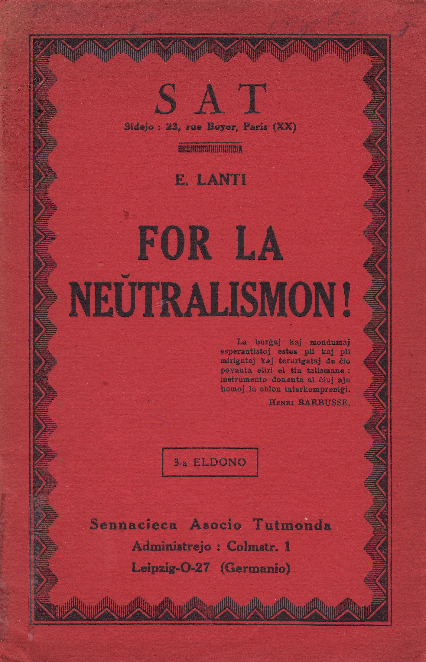 Kovrilo de la libro For la Neŭtralismon! , 1922